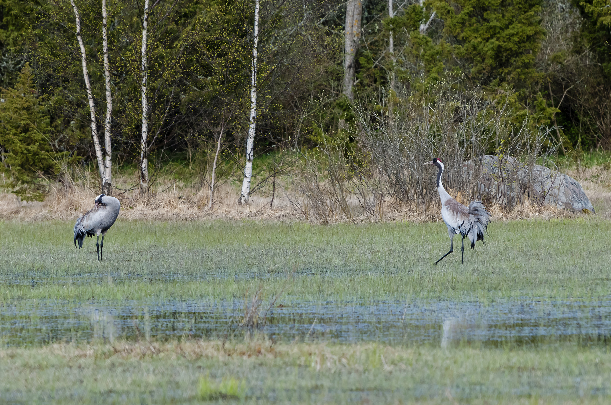 Sookured Osmussaarel.